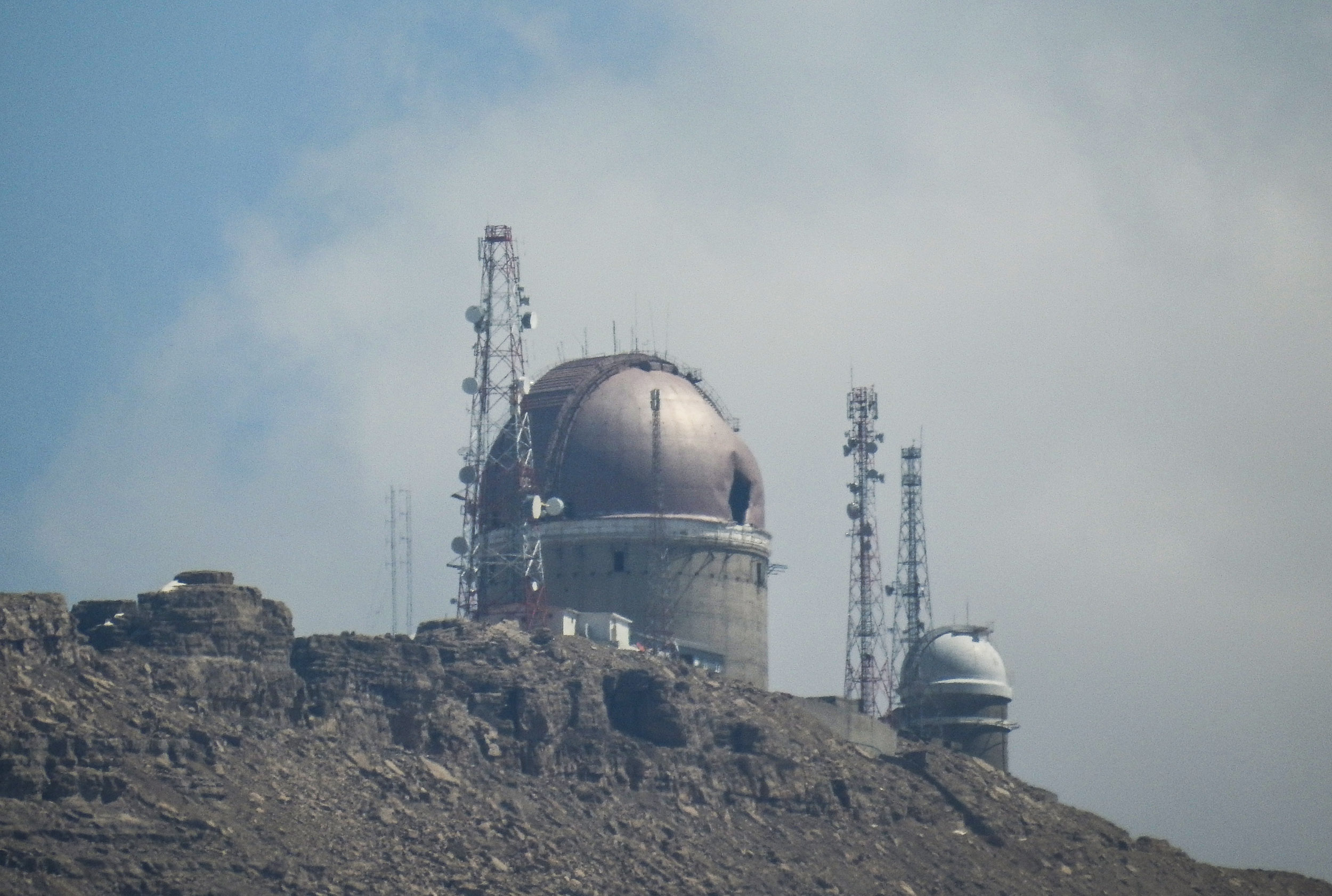 کوردی: ڕوانگەی ھەولێر لەسەر چیای کۆڕەک